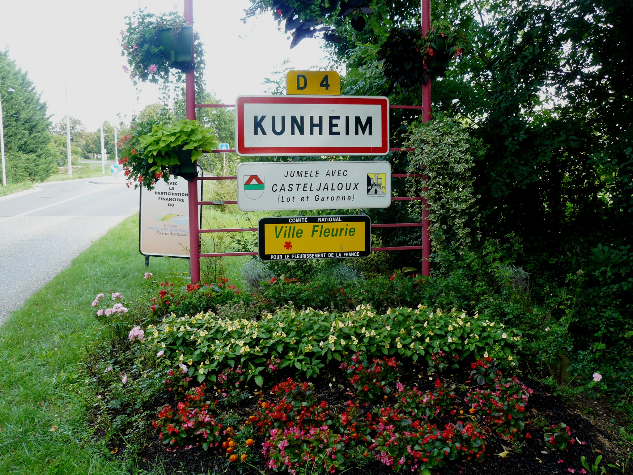 Entrée du village de Kunheim